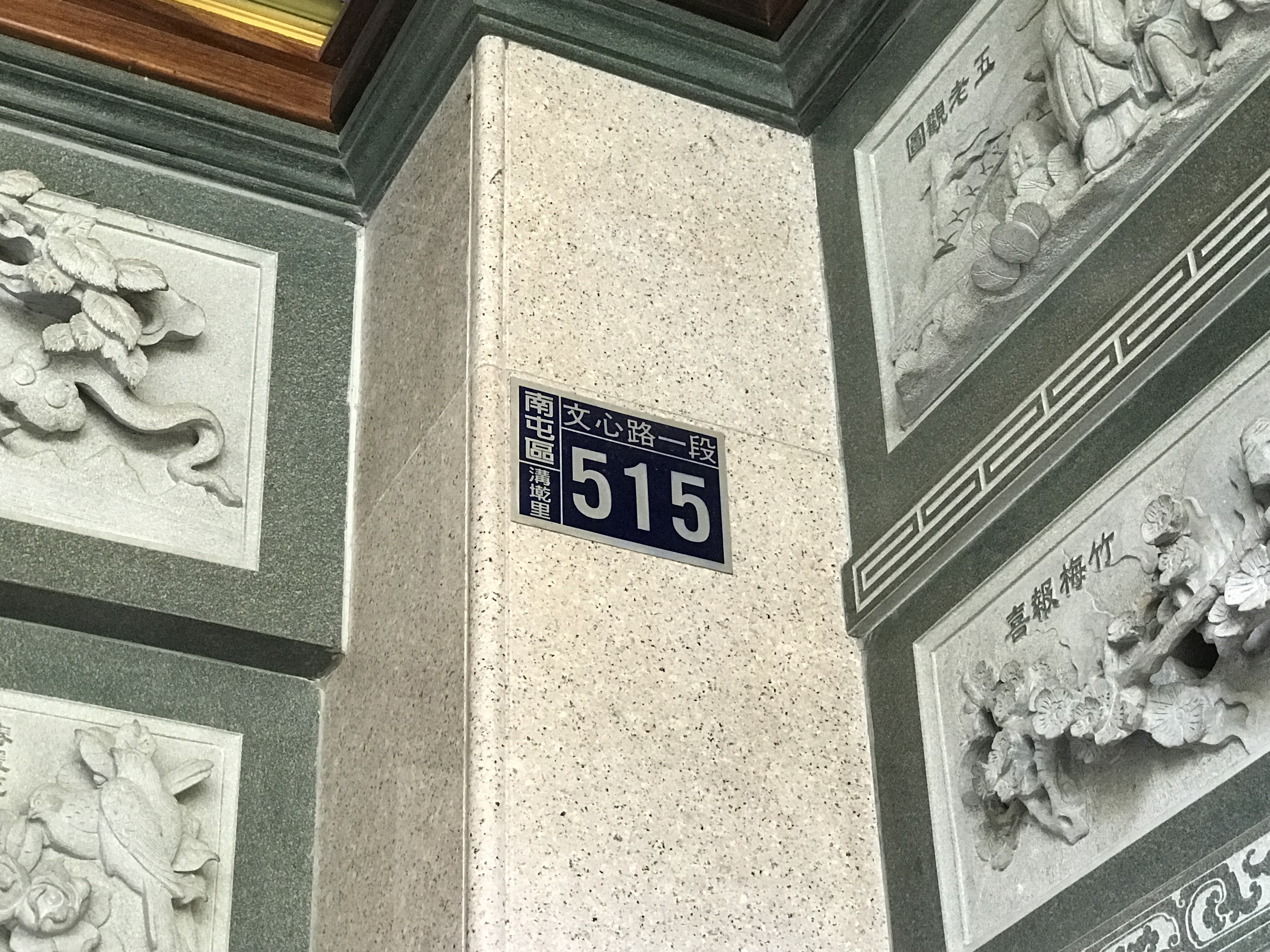 中文（台灣）: 水安宮門牌